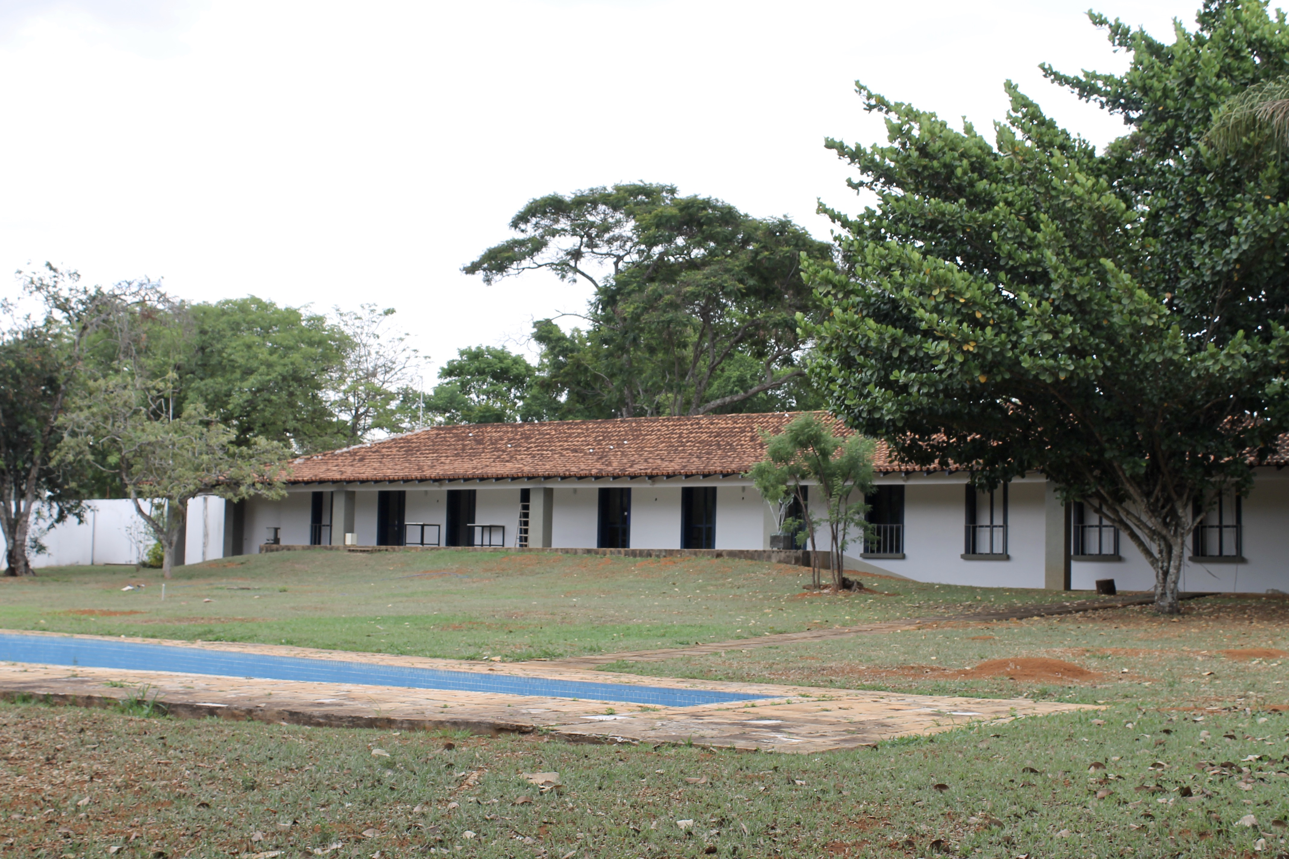 Área posterior do terreno da Casa Niemeyer, em que é possível ver a Casa e parte da piscina da residência